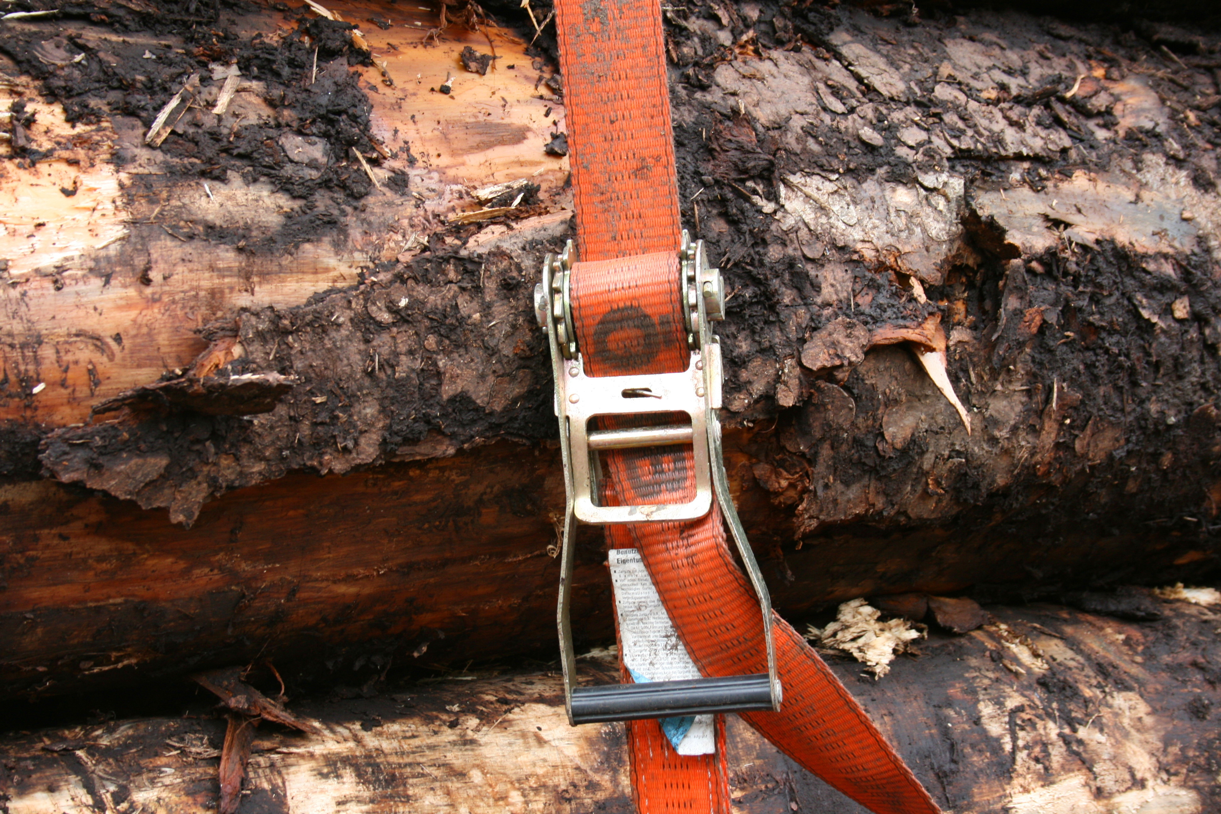 Rungenwagen zum Holztransport der Rail Cargo Austria auf dem Bahnhof Brügge in Lüdenscheid-Brügge